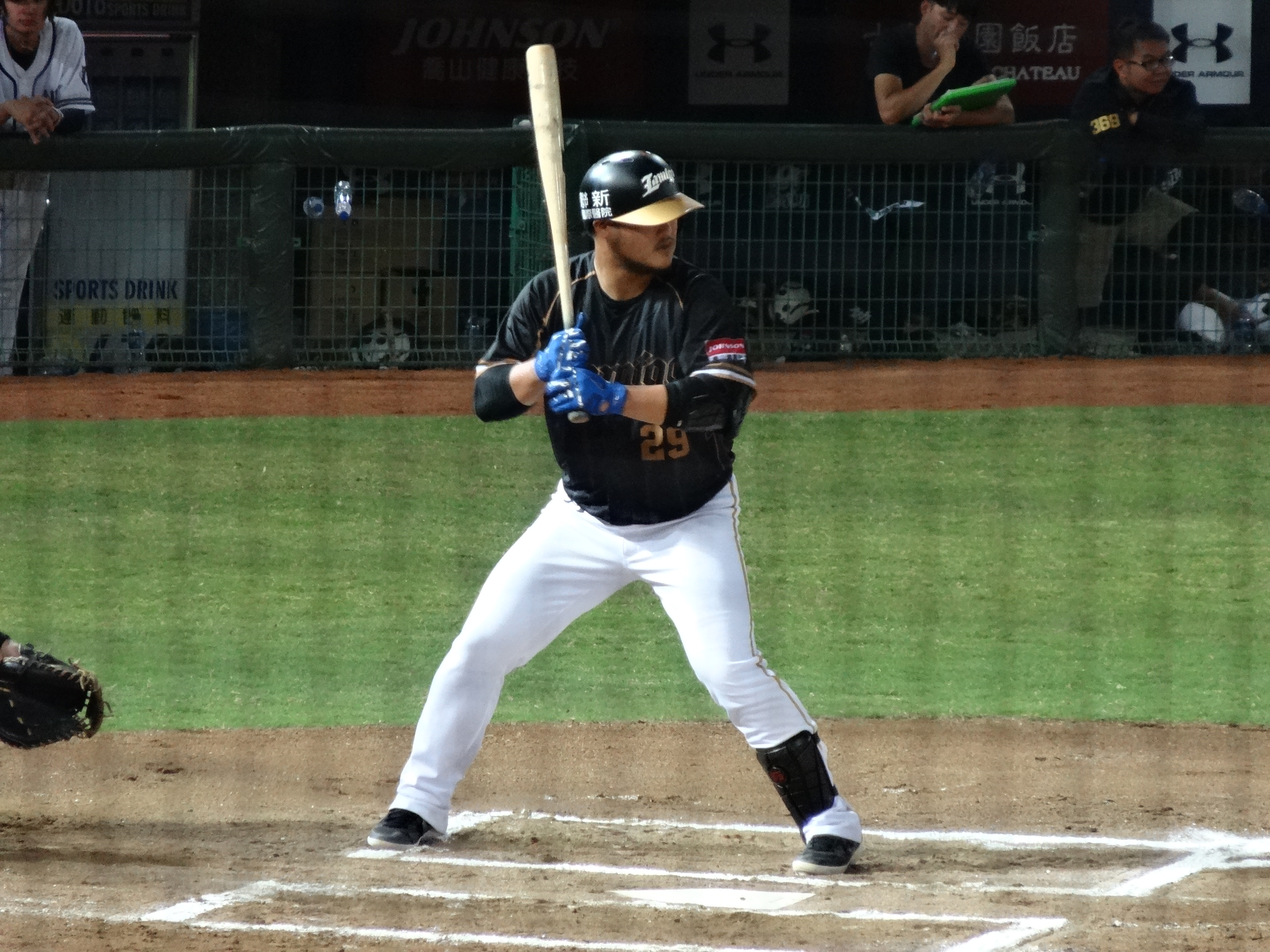 陳俊秀於2019年7月20日在桃園棒球場上場打擊